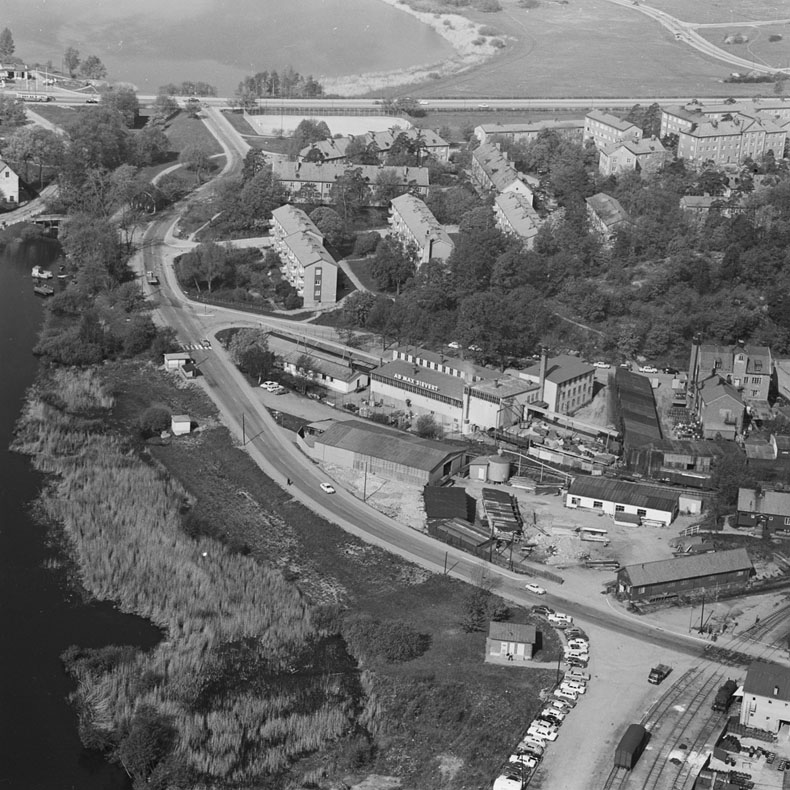 AB Max Sievert. Ekbacksvägen/Johannesfredsvägen, Ulvsunda. Motiv: AB Max Sievert Nyckelord: Flygbilder Kategori: Maskinindustri - Tillverkning av elektriska prod., Bostadsområde AB Max Sievert. Ekbacksvägen/Johannesfredsvägen, Ulvsunda.